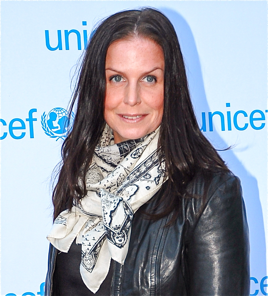 Titti Schultz på Unicef-gala i Stockholm den 1 maj 2012.